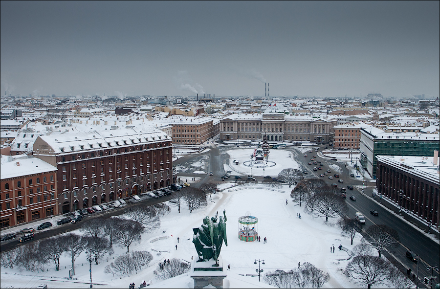 Ансамбль Исаакиевской площади в новогодние праздники